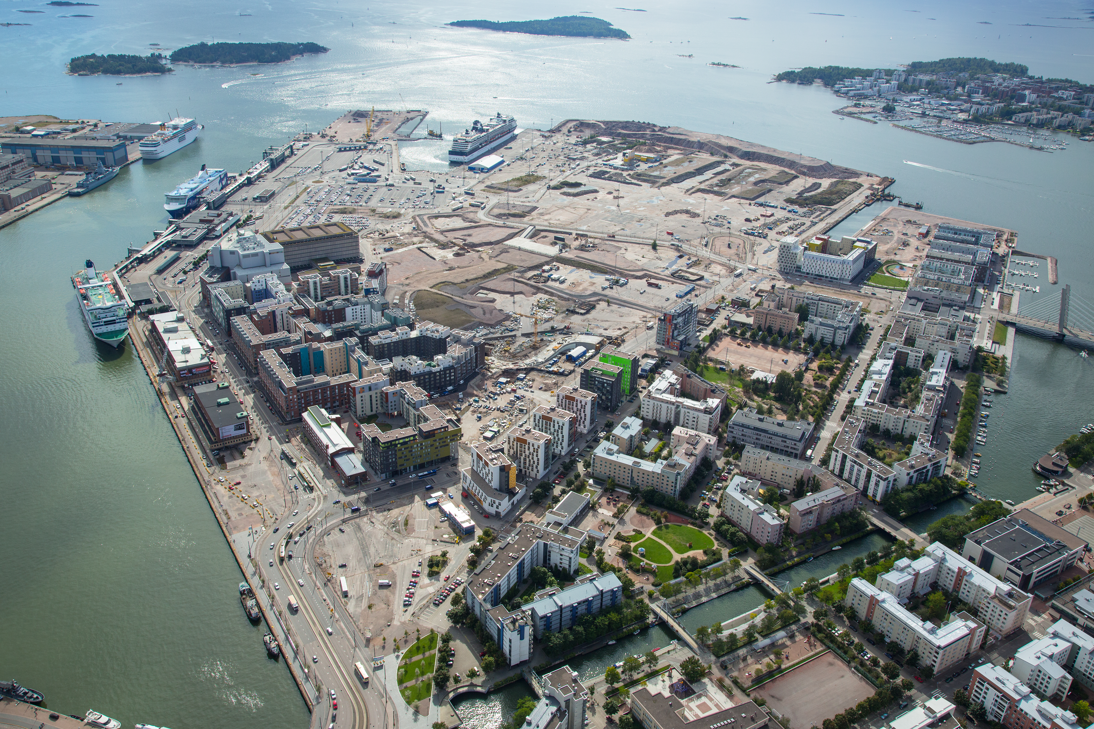 Jätkäsaari, uuden asuinalueen rakentaminen. Länsisatamassa Jätkäsaarenlaiturissa St. Peter Linen Pietariin liikennöivä matkustaja-alus ms Princess Maria ja Eckerö Linen Tallinnaan liikennöivä ms Finlandia. Etualalla Ruoholahden asuinalue. Taustalla Pihlajasaari.